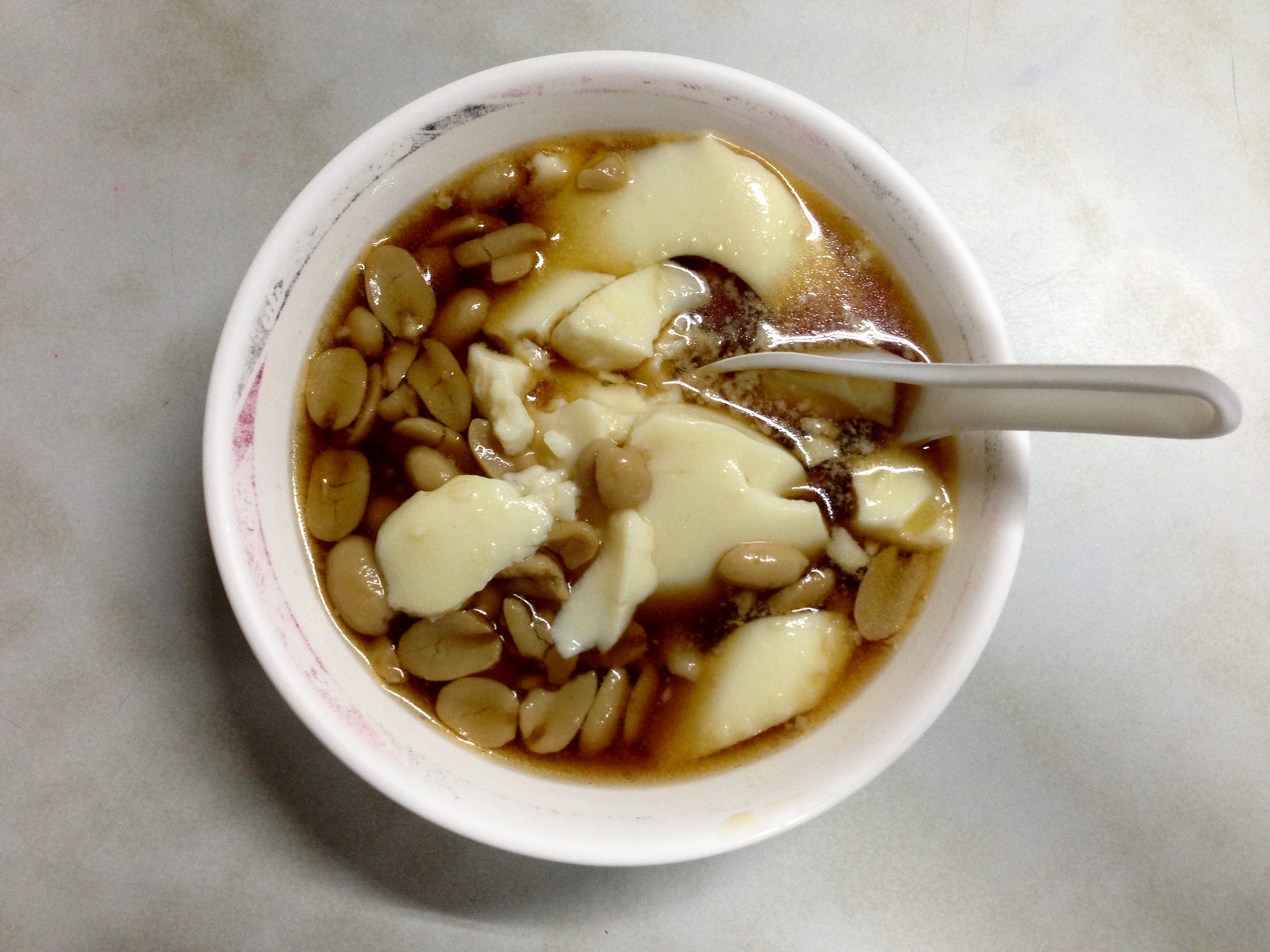 一碗花生豆花